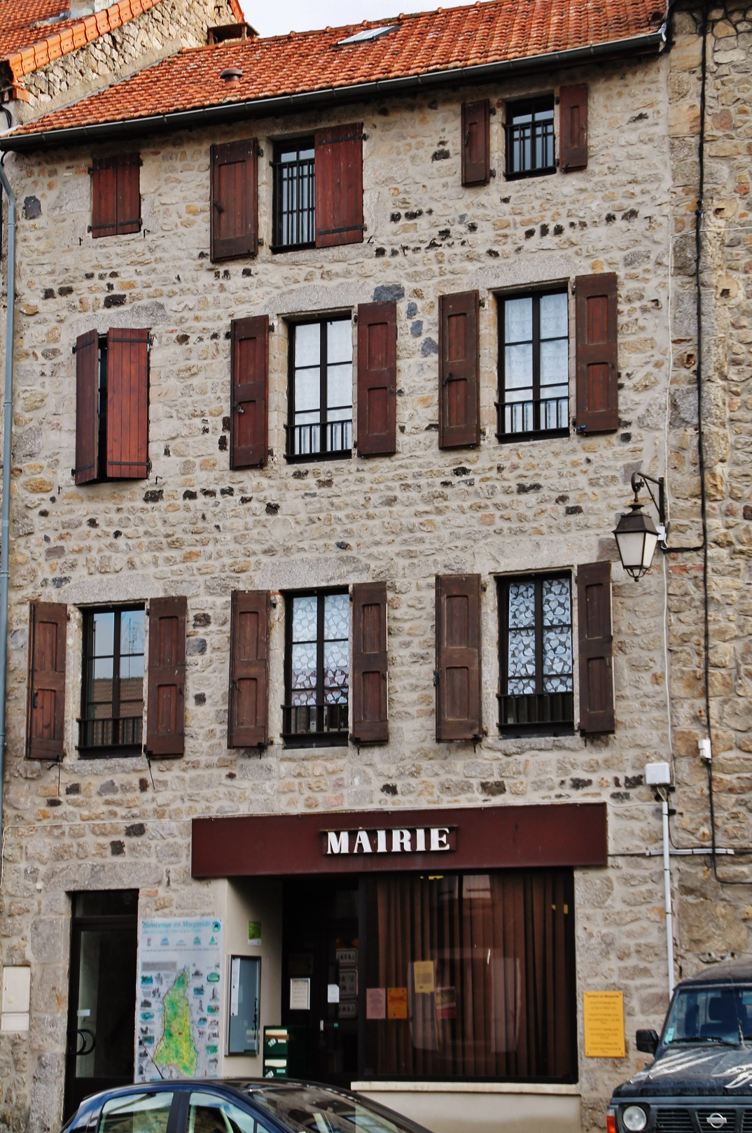 La Mairie